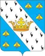 Герб Медынского района, Калужская область